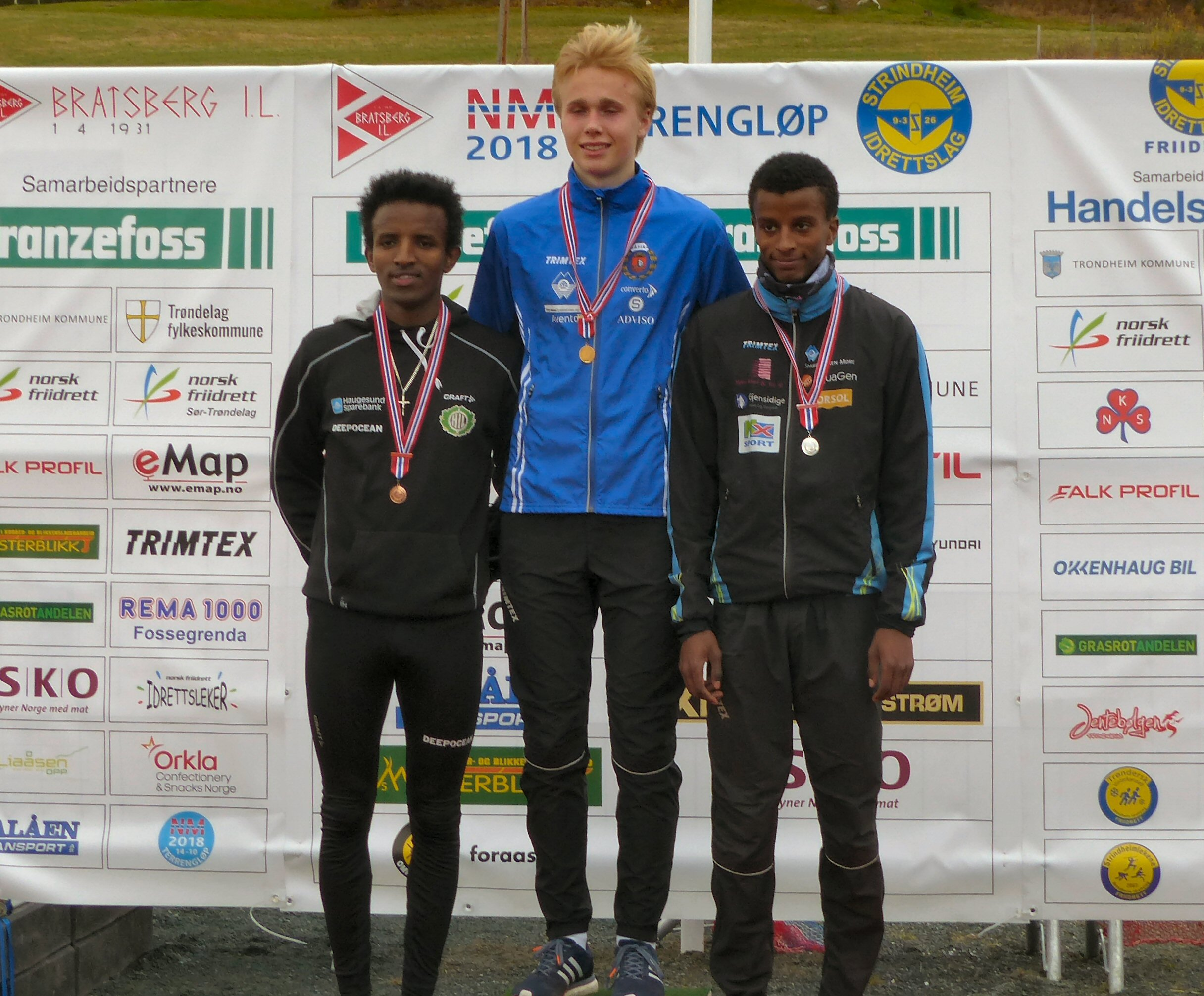 NM i terrengløp, lang løype, Bratsberg - Trondheim, 2018. Seierspallen for menn junior.